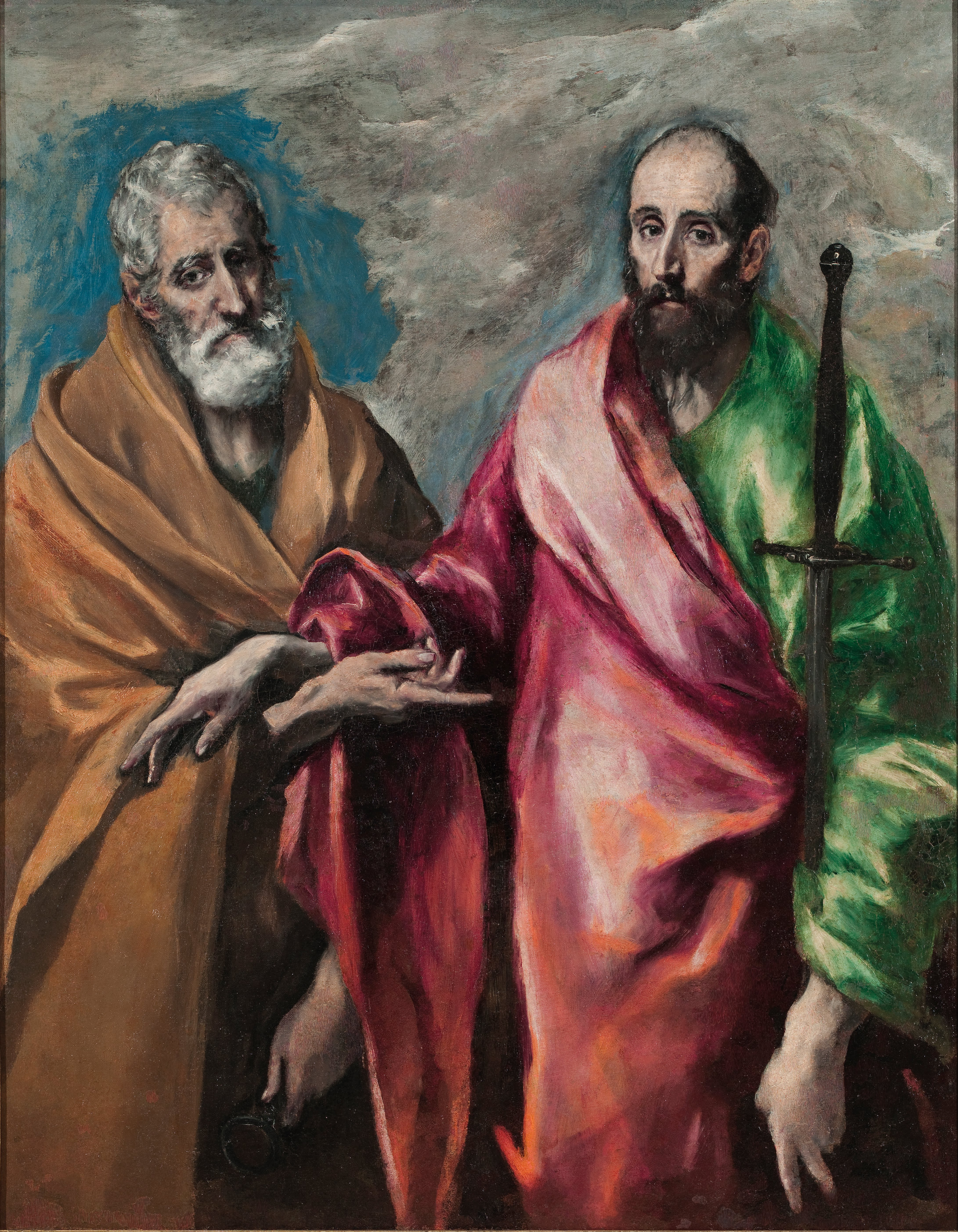 La obra representa a los apóstoles San Pedro, el primer papa de la Iglesia Católica, y San Pablo, llamado el Apóstol de los gentiles.